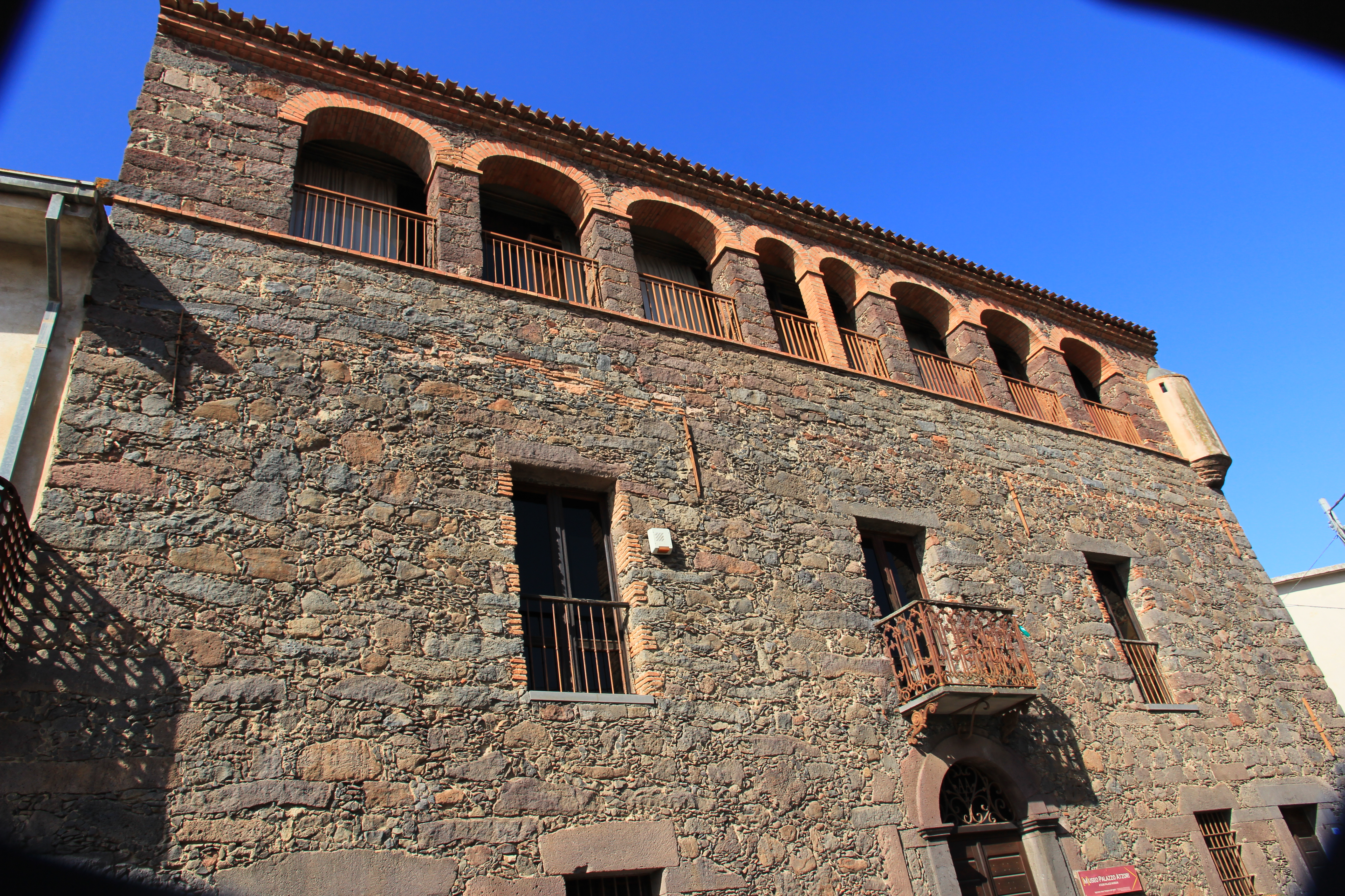 Paulilatino - Palazzo Atzori, Museo archeologico